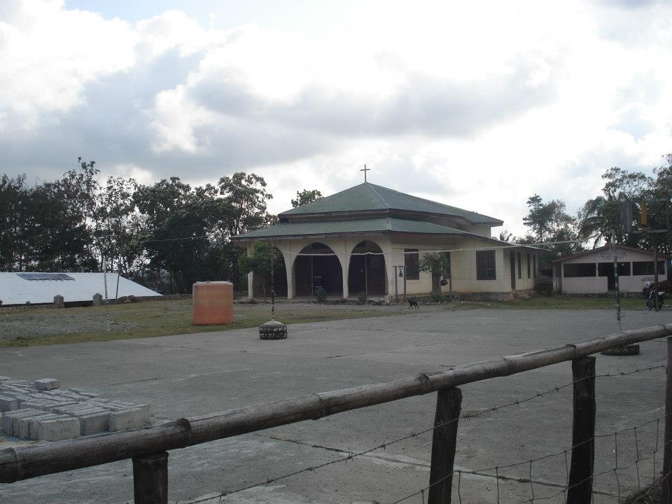 Fohoren